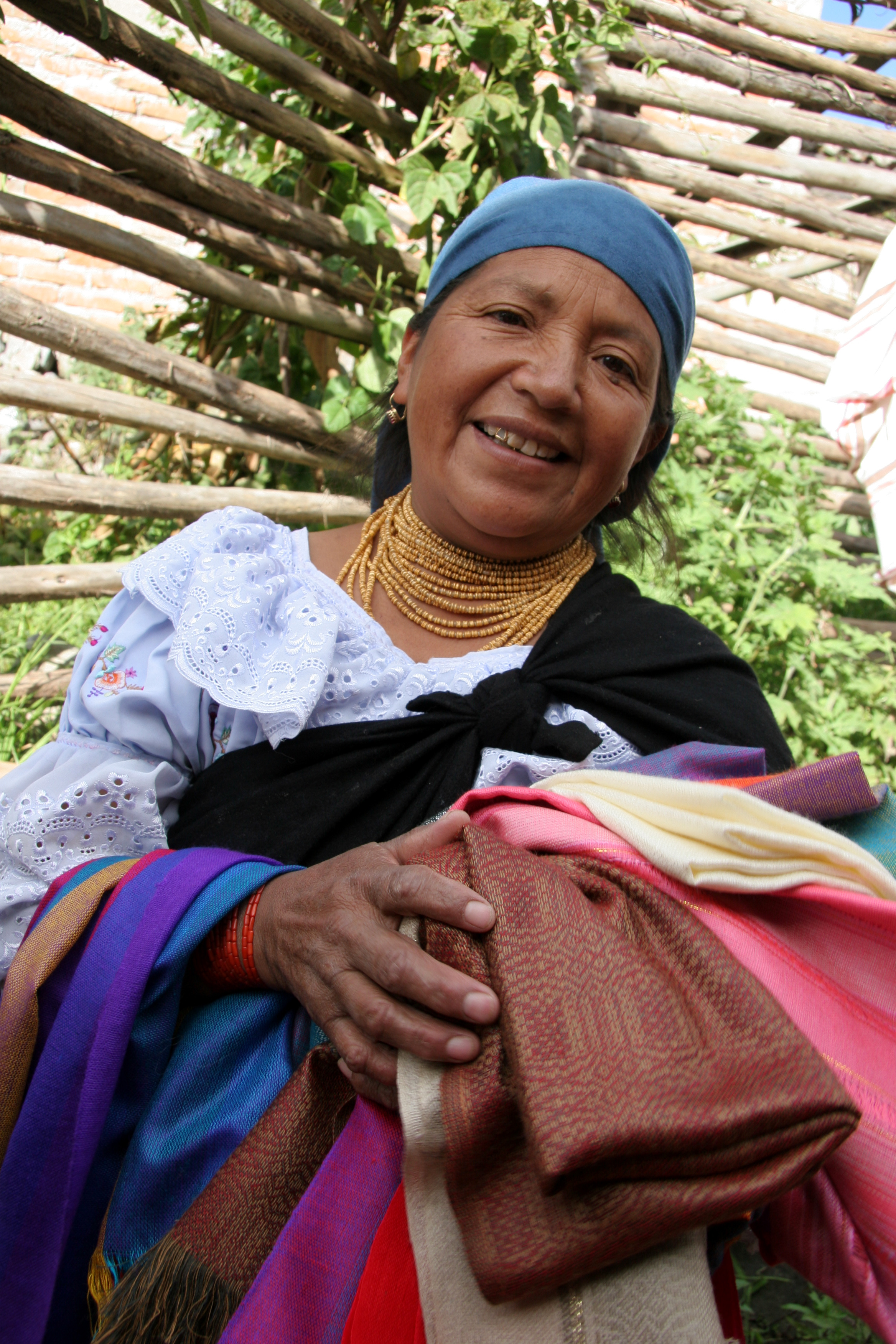 equateur, otavalo, femme quechuas otavallo